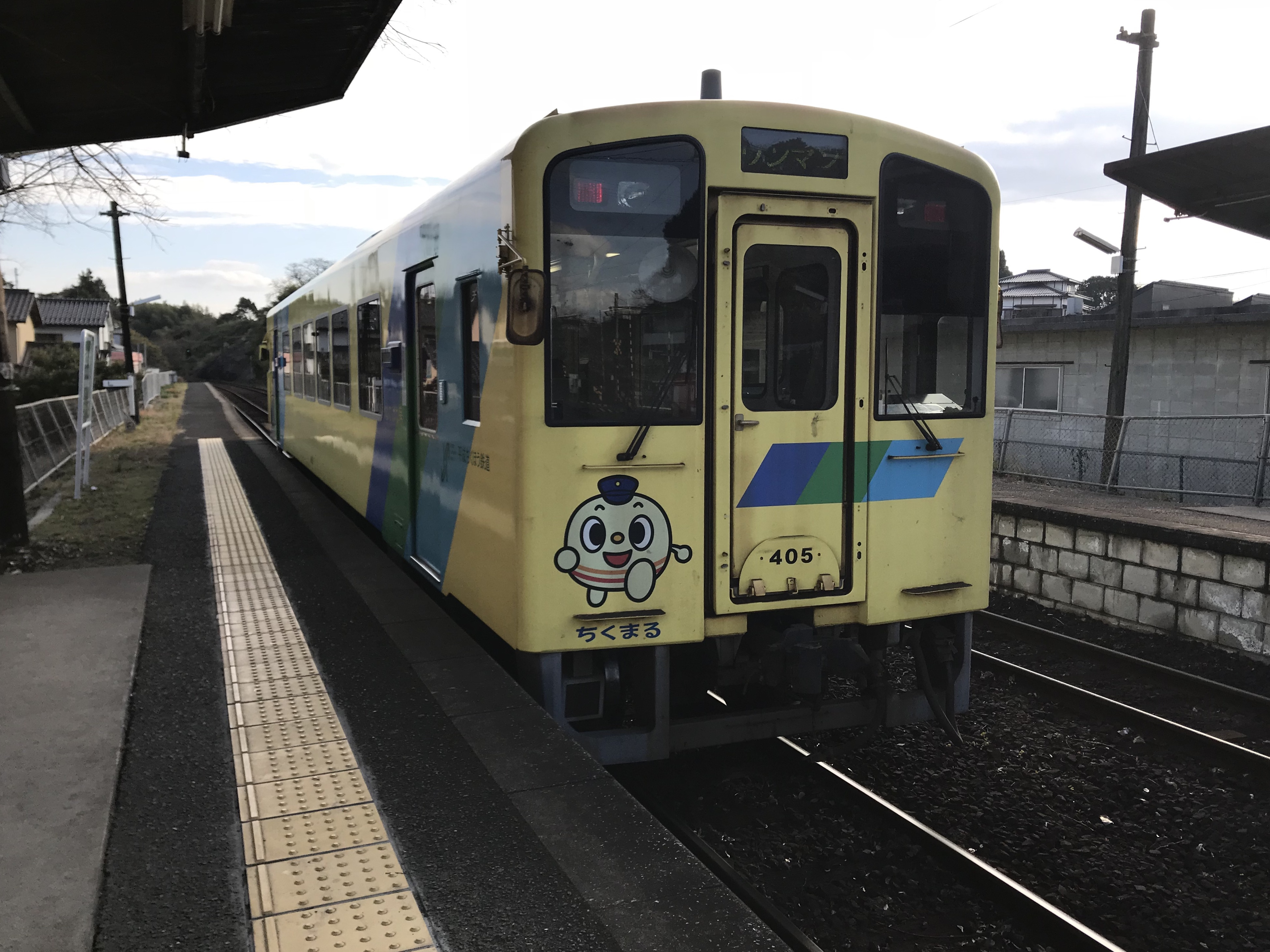 赤池駅に到着する平成筑豊鉄道伊田線の列車